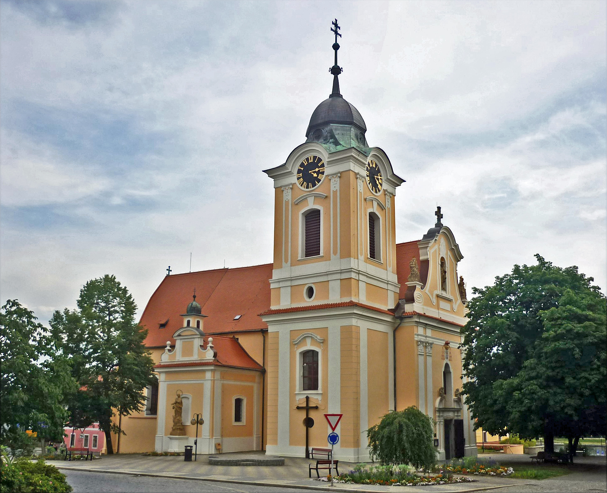 Jakobskirche in Moldauthein (Týn nad Vltavou ) in Südböhmen